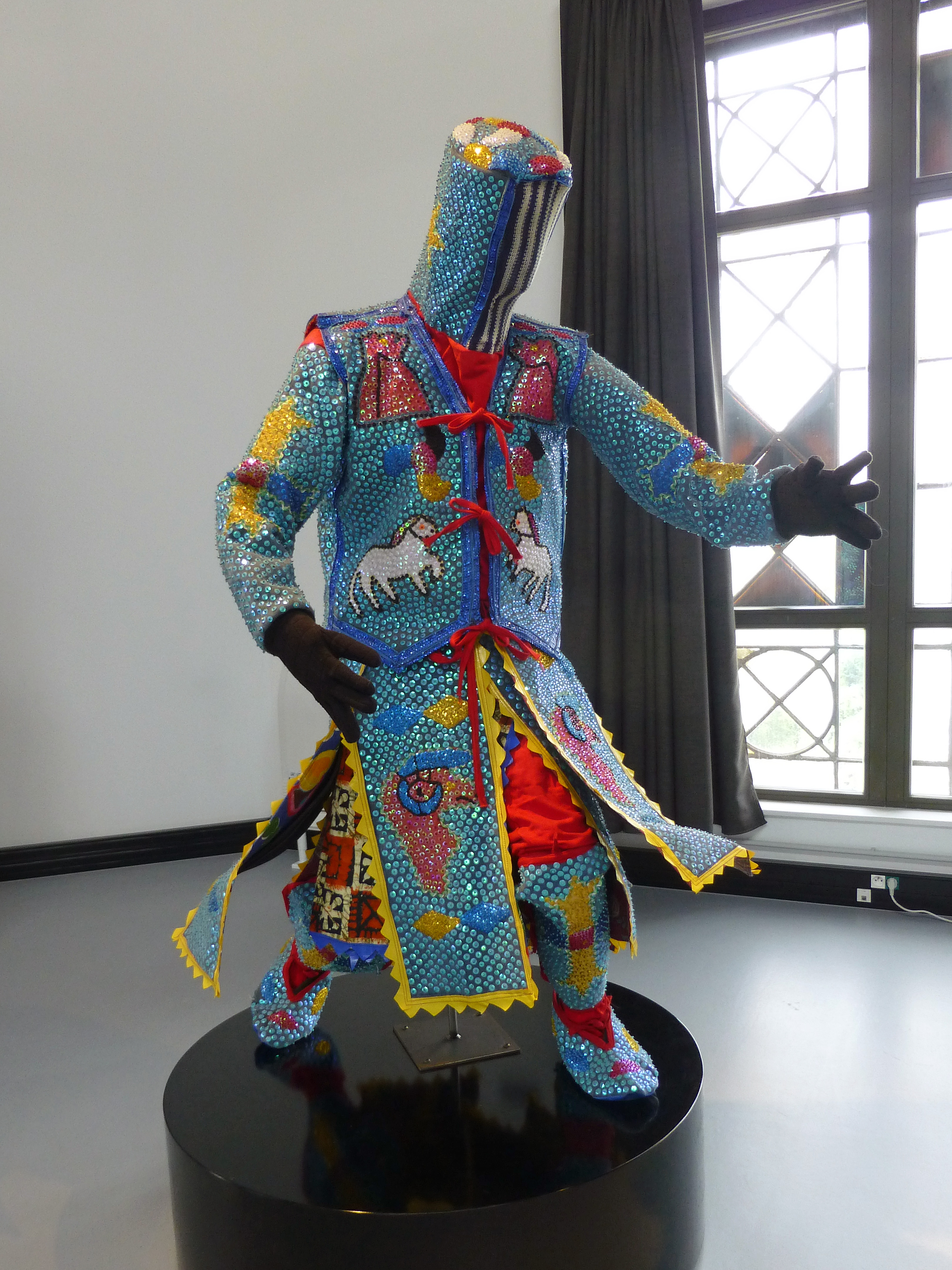 Musée Vodou (Strasbourg) : masque-costume Gèlèdè ; population Nago-Yorouba, Bénin, 2013.